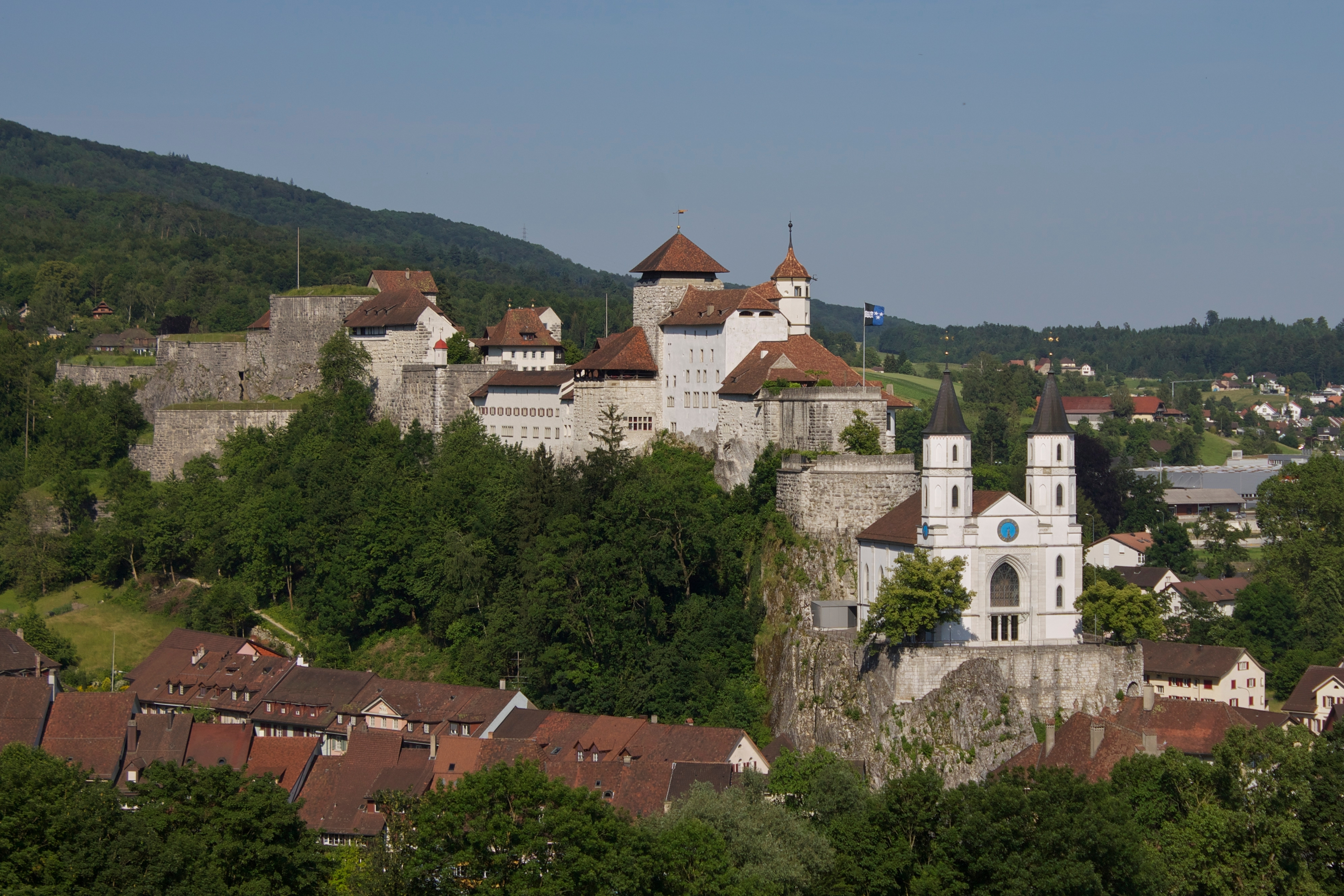 Die Festung Aarburg